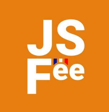 Logo de Je suis français et européen.